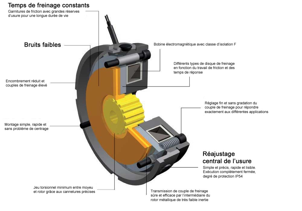 structure détaillée du frein de sécurité ROBA-stop-M